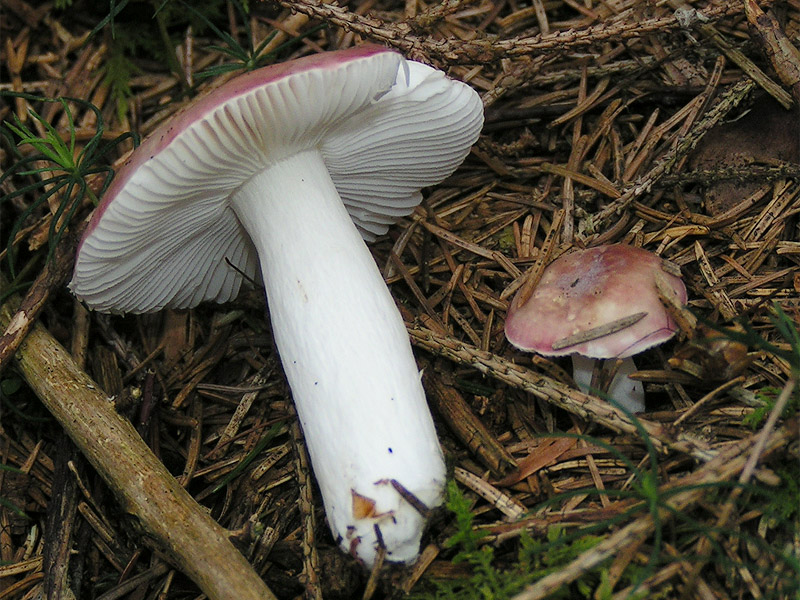 Russula betularum - Russulaceae